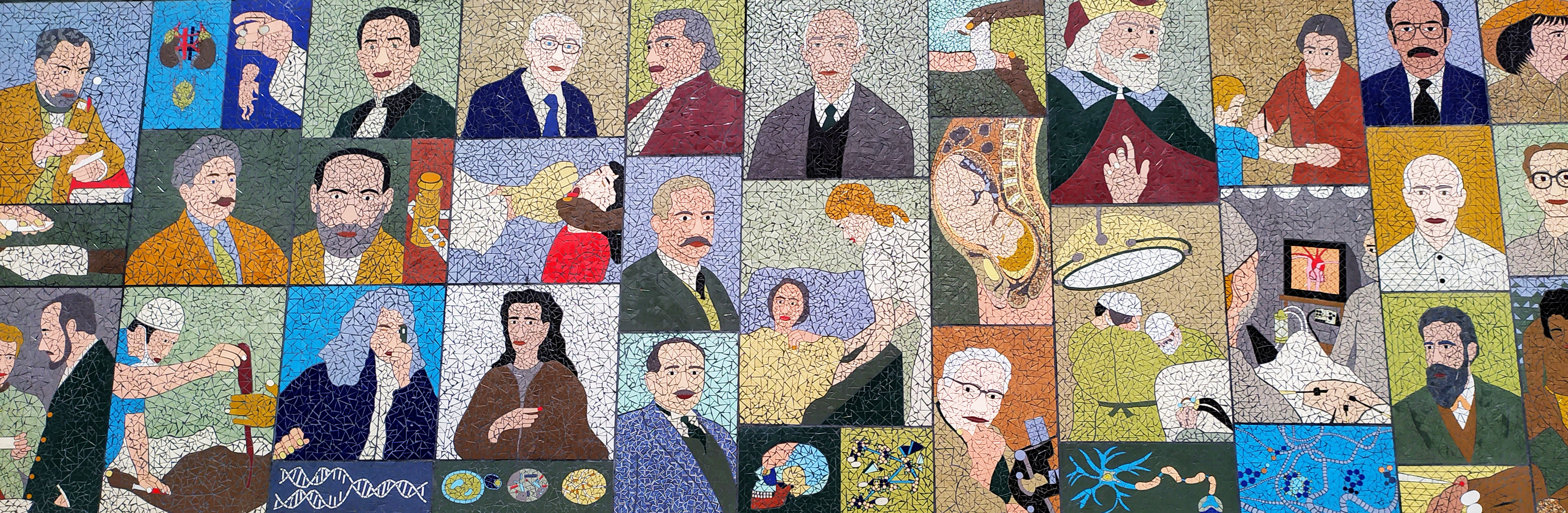 Painel artístico na entrada do hospital Universitário da UFSC